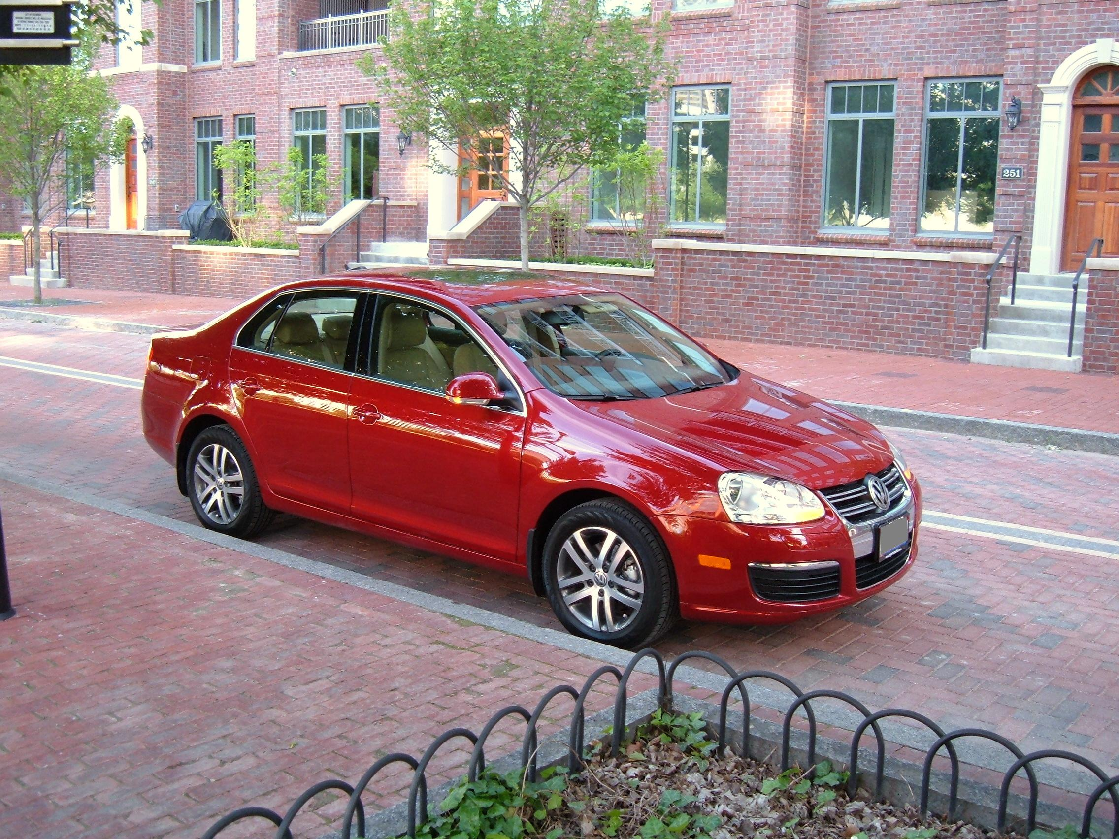 2006 Volkswagen Jetta MkV. U.S. Spec. 2.5L 5-cylinder gasoline, Package 2. Self Made Photo.